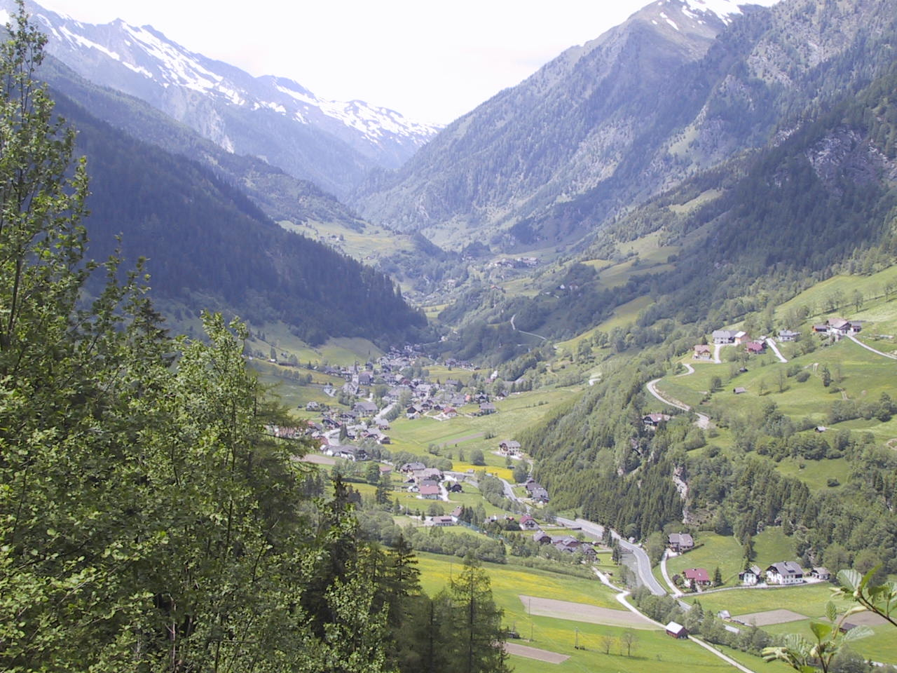 Murtal im Lungau